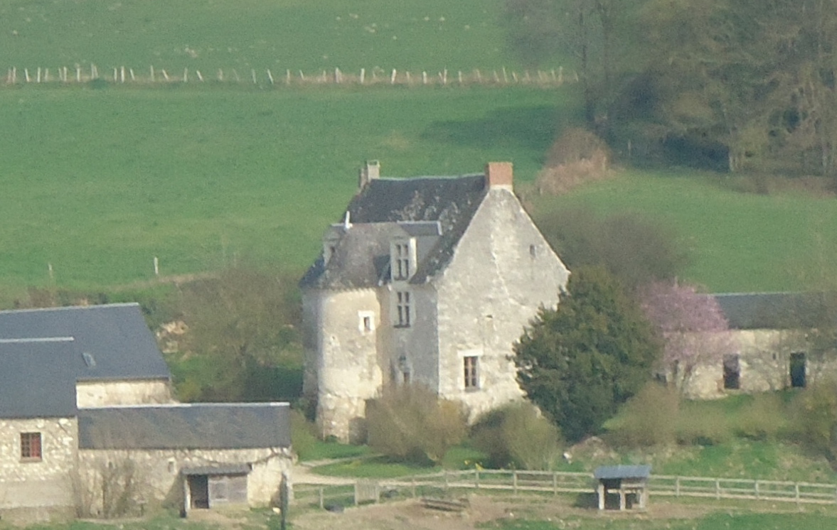 Manoir de la Chicaudière - Broc - Maine-et-Loire (49)